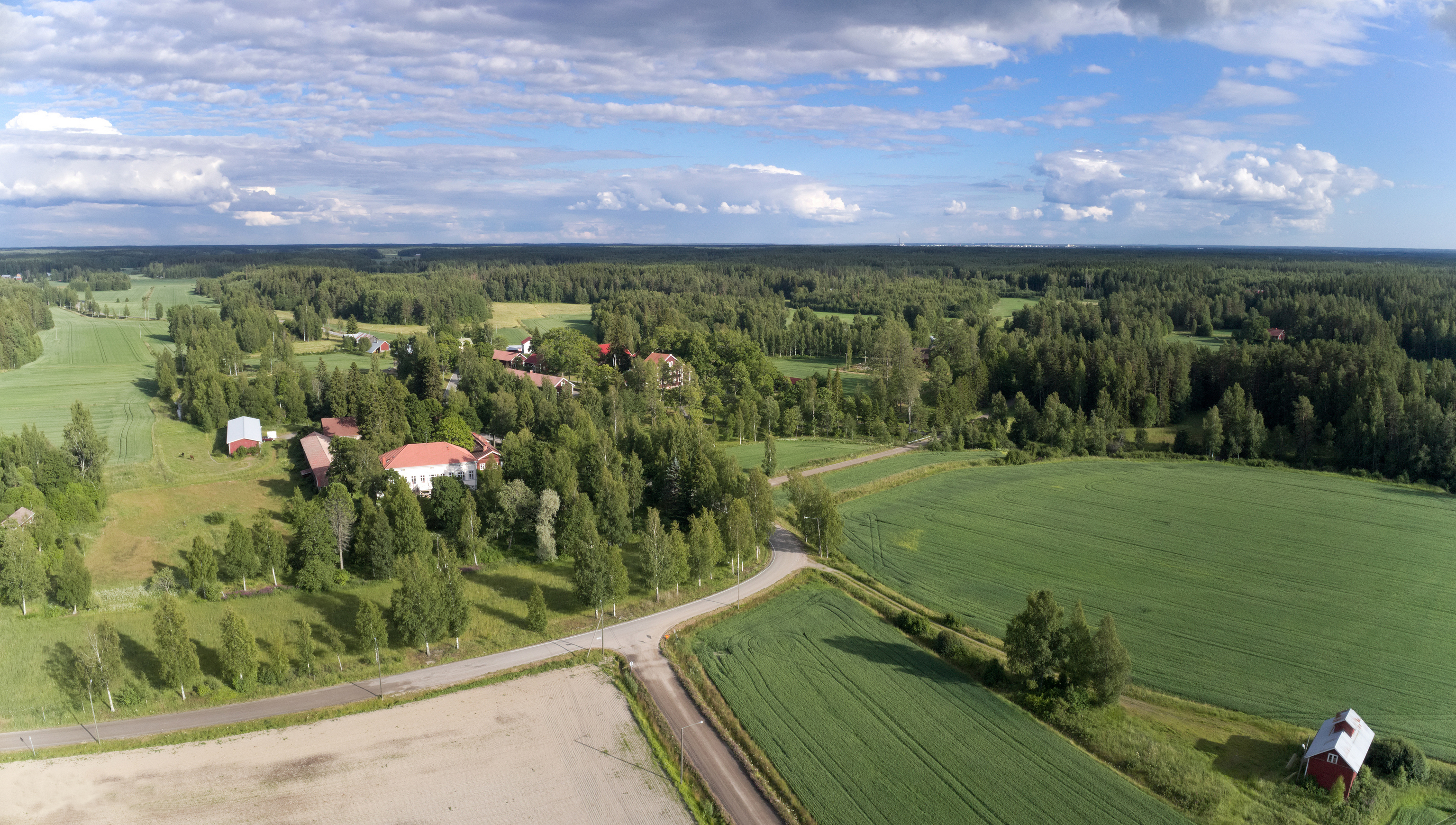 Kellahden kartanomaisema